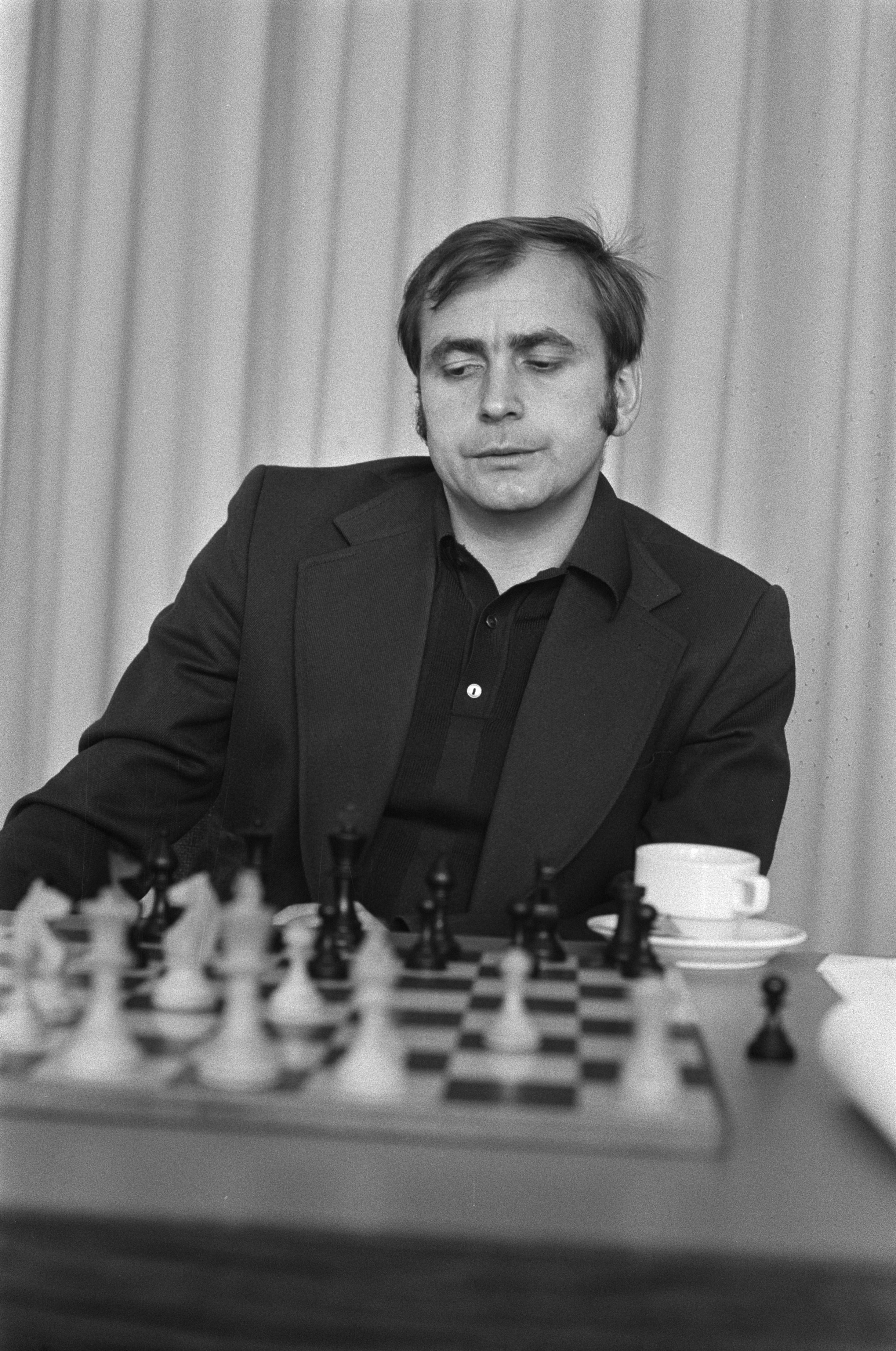 Collectie / Archief : Fotocollectie Anefo Reportage / Serie : [ onbekend ] Beschrijving : IBM-schaaktoernooi, 11e ronde, nr. 9, 10 Ivkov, nr. 11, 1 Jansa (koppen) Datum : 29 juli 1974 Trefwoorden : schaken Persoonsnaam : Ivkov, Jansa Instellingsnaam : IBM-Schaaktoernooi Fotograaf : Croes, Rob C. / Anefo Auteursrechthebbende : Nationaal Archief Materiaalsoort : Negatief (zwart/wit) Nummer archiefinventaris : bekijk toegang 2.24.01.05 Bestanddeelnummer : 927-3568